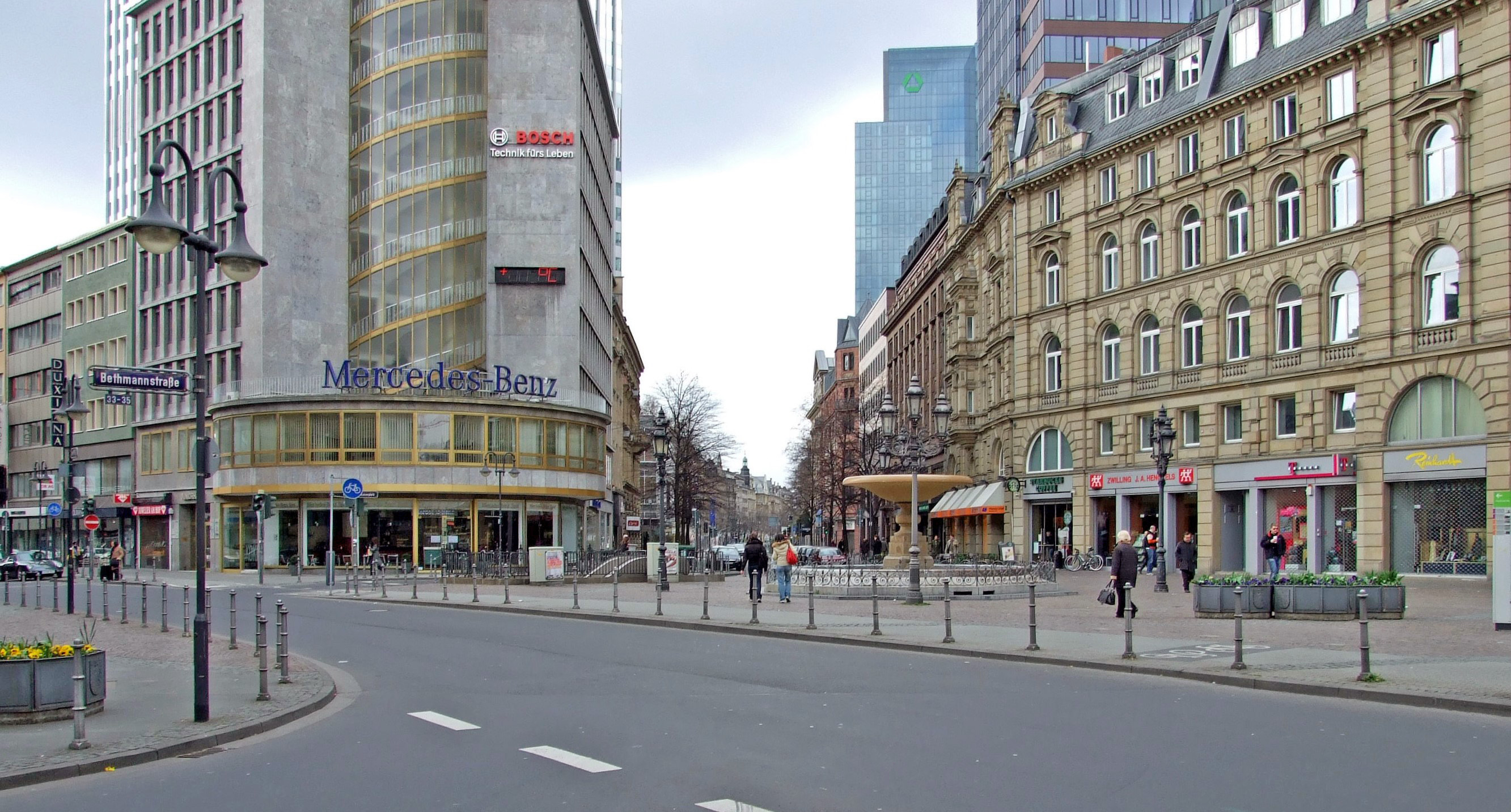 „S-Kurve“ der Kaiserstrasse am „Kaiserplatz“ in Frankfurt am Main, Blickrichtung Hauptbahnhof